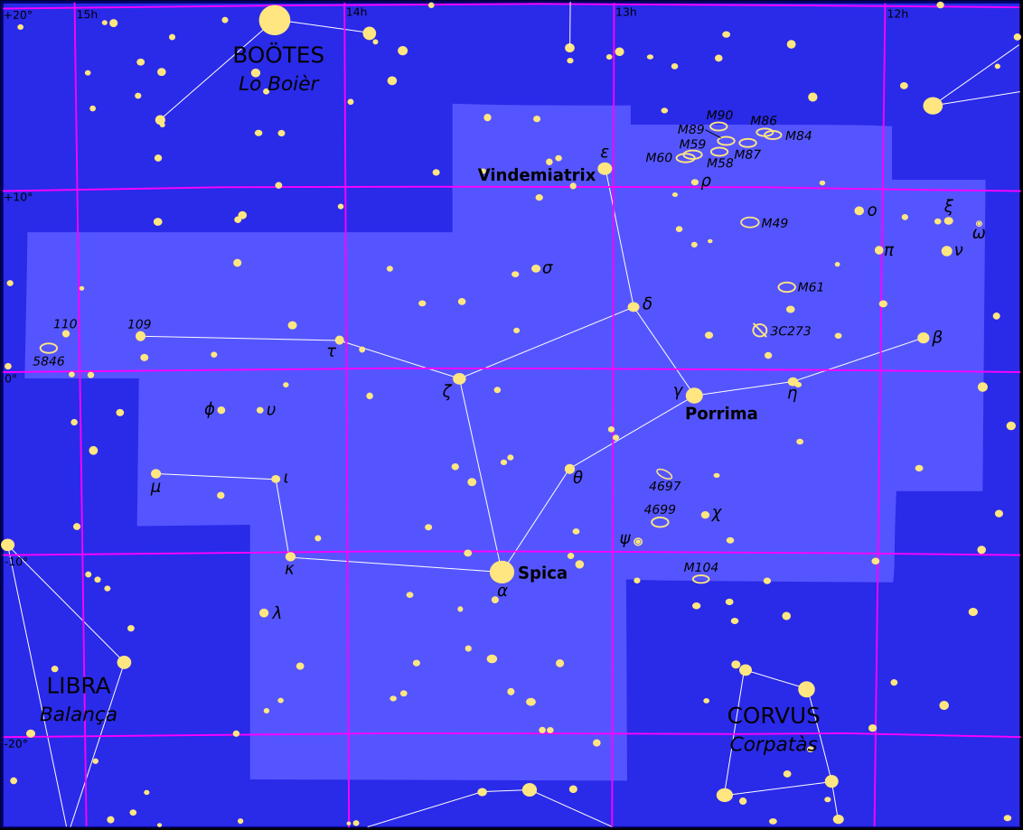 Constellacion de la Verge.